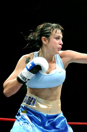 Boxeadora uruguaya en una pelea.